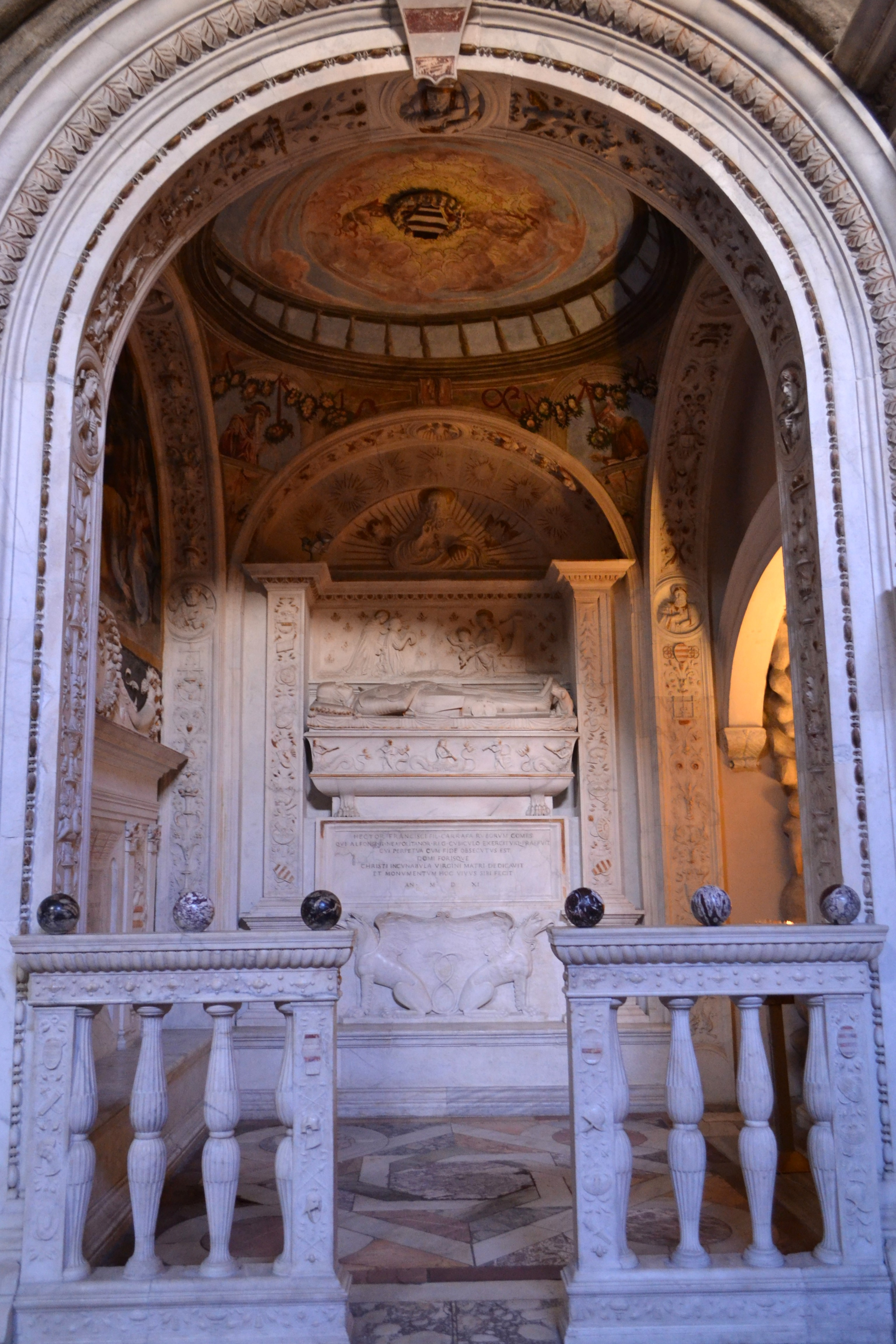 Cappella di Santa Rosa da Lima (II cappella del Cappellone del Crocifisso, all'interno della chiesa di San Domenico Maggiore di Napoli)